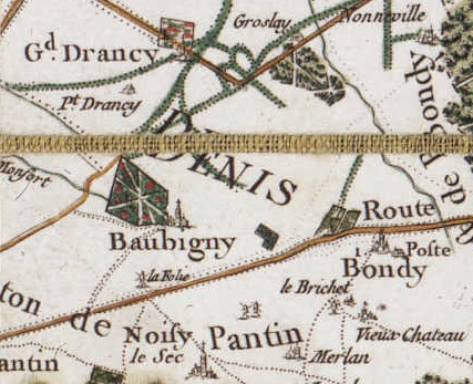 Bobigny (France) - Carte de Cassini, vers 1780